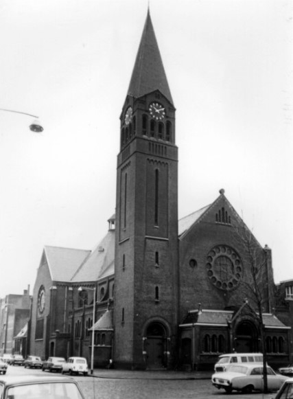 2005-5062 Beschrijving: -5062: Het Afrikaanderplein bij de Paul Krügerstraat met de RK Sint-Franciscuskerk, kerk van de H. Franciscus van Assisië. Datering: 02-02-1971 - 22-02-1971 Toegangsnummer: 4100 Collectie: Fotocollectie Vervaardiger: Alex (Lex) (A.) de Herder, 03/01/1927-02/02/2000 Auteursrechthouder: Gemeente Rotterdam Auteursrechtelijk beschermd: Nee Documentsoort: Fotografisch document Downloadbaar: Ja